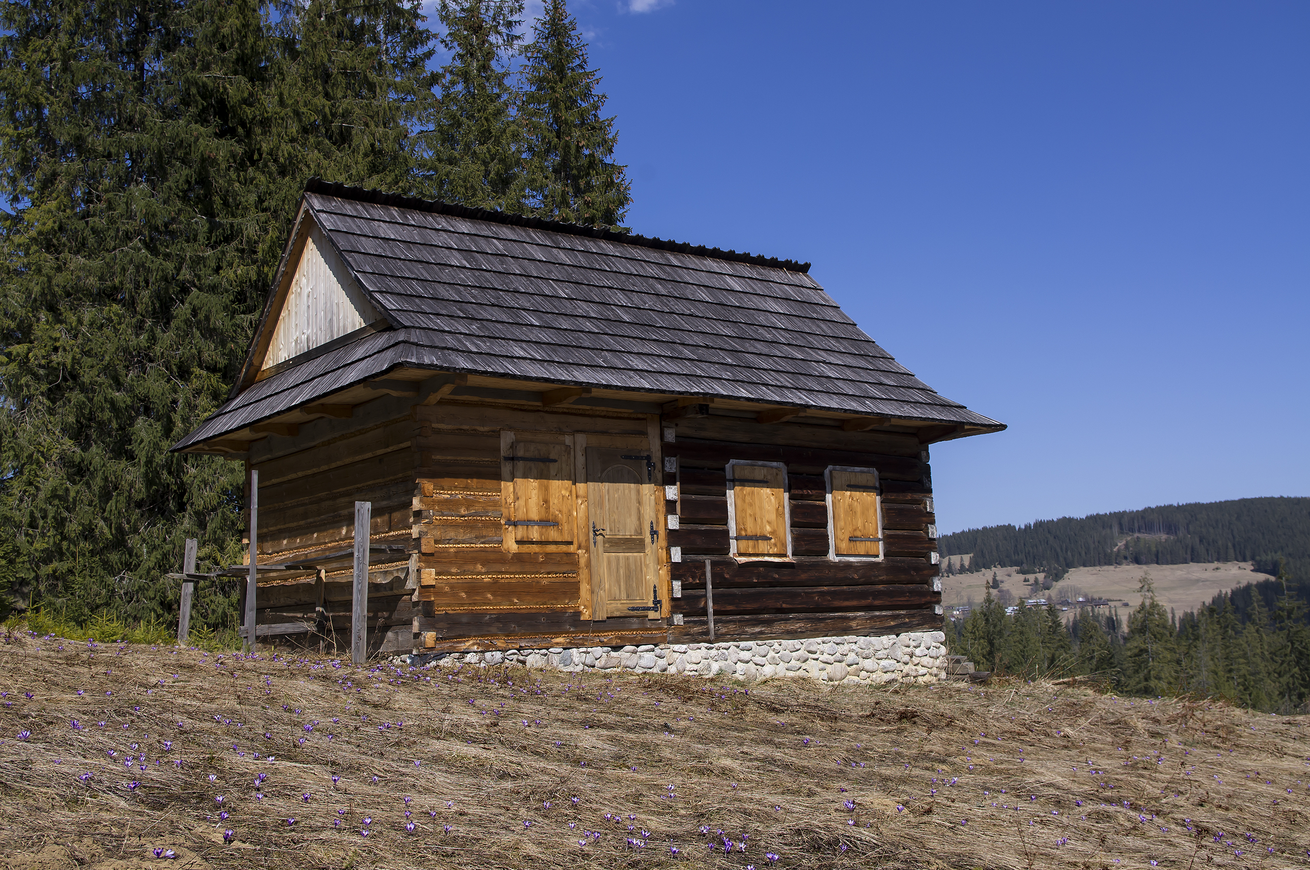 Polna Hawryłówka